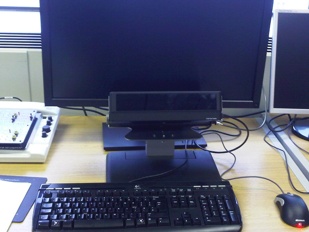 Dispositif fixe d'Eye tracking